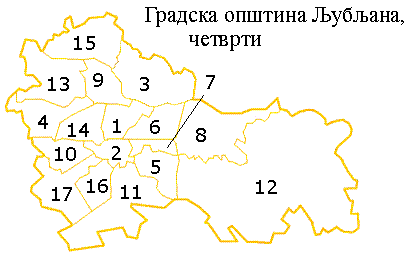 Четврти градске општине Љубљана